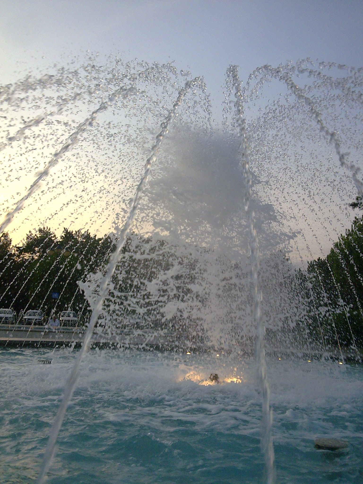 Szökőkút Bibionéban, Olaszországban